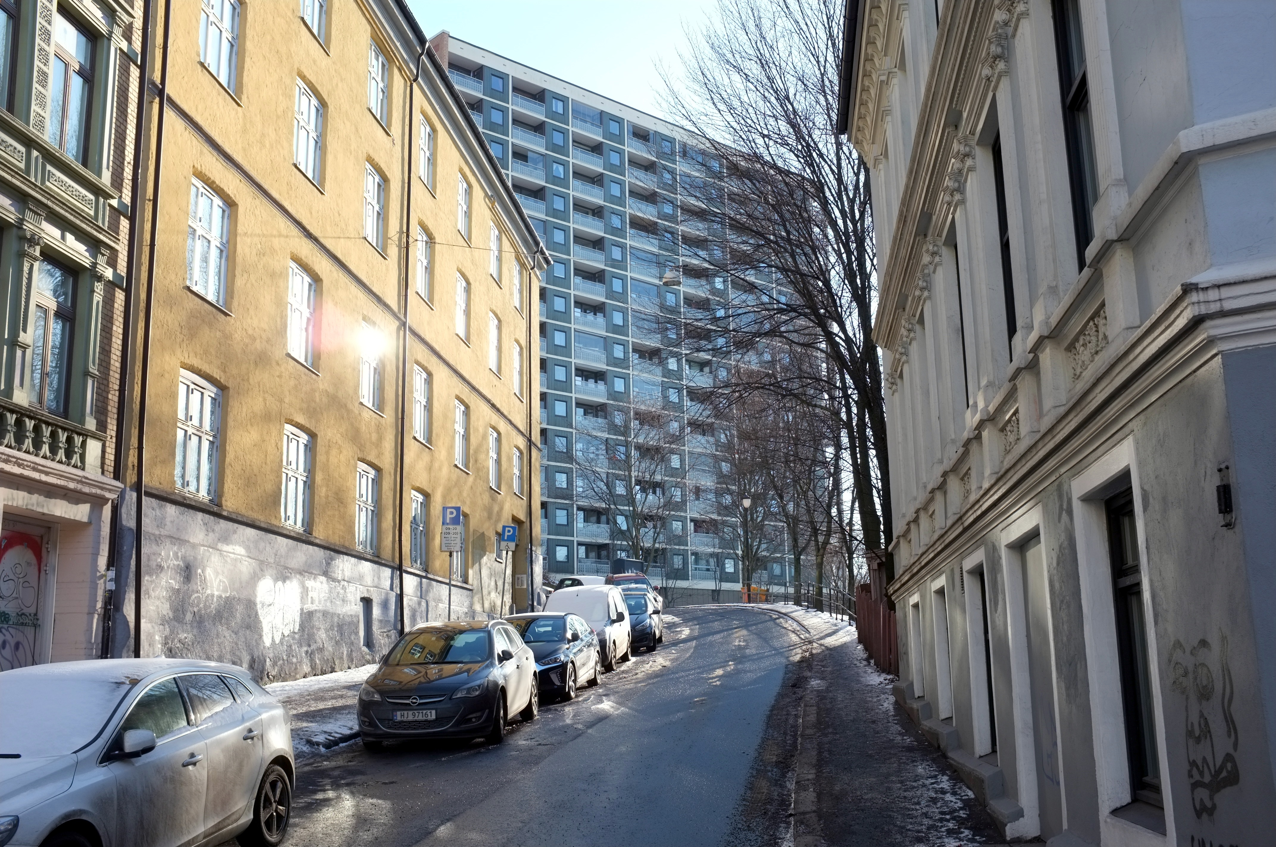 Sørligata i Oslo.